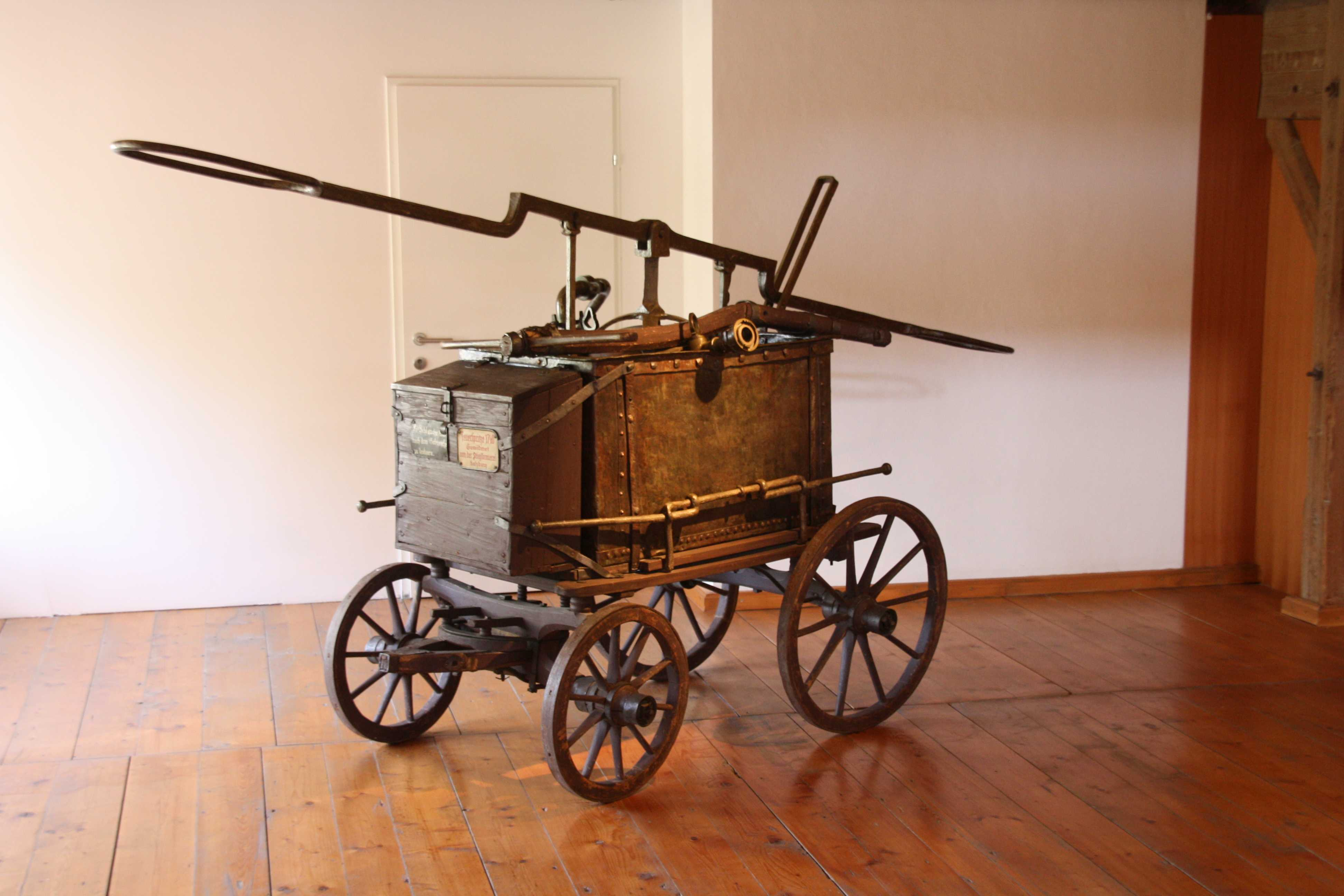 Feuerspritze von 1740, gewidmet von der Stiegl-Brauerei Salzburg; im Brauereimuseum ausgestellt